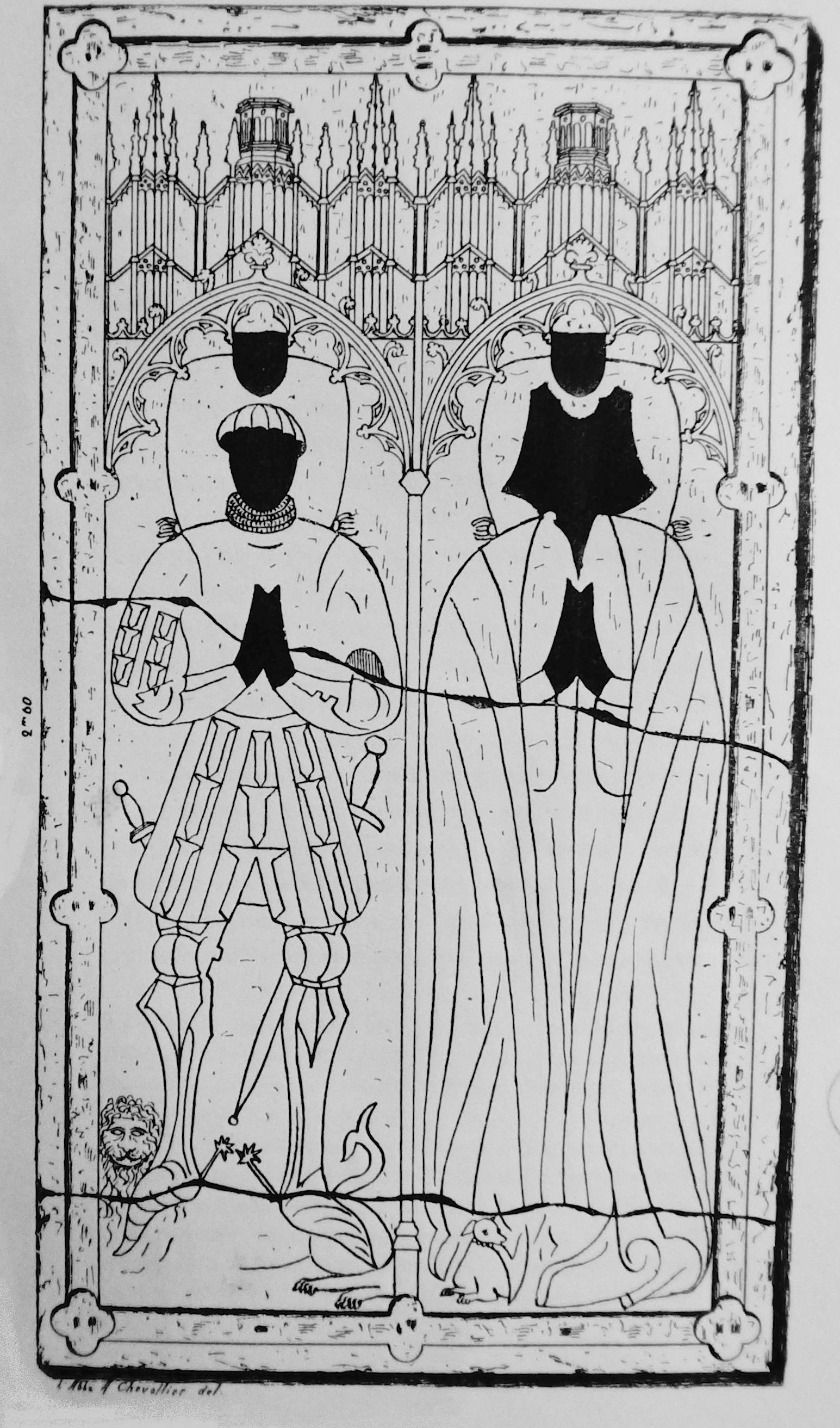 Gisant de pierre bleue de Givet de 1440, elle avait une bande de cuivre où figurait l'inscription et des parties de marbre blanc pour les visages, mains. Les blasons étaient de cuivre émaillé ; au prieuré de Binson. Bibliothèque de Reims CH1539.